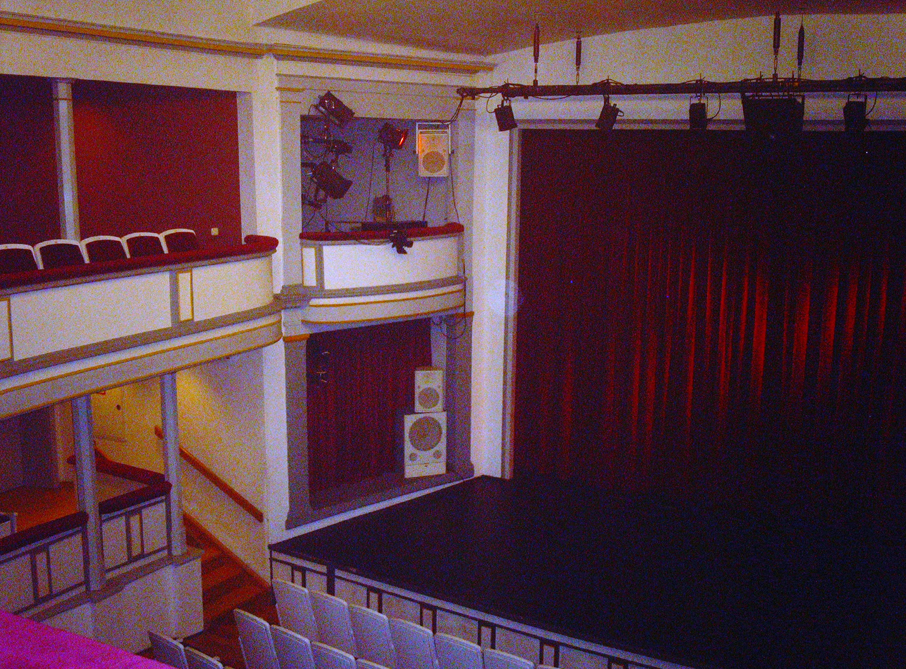 Bühne im Schloßtheater Arnstadt.